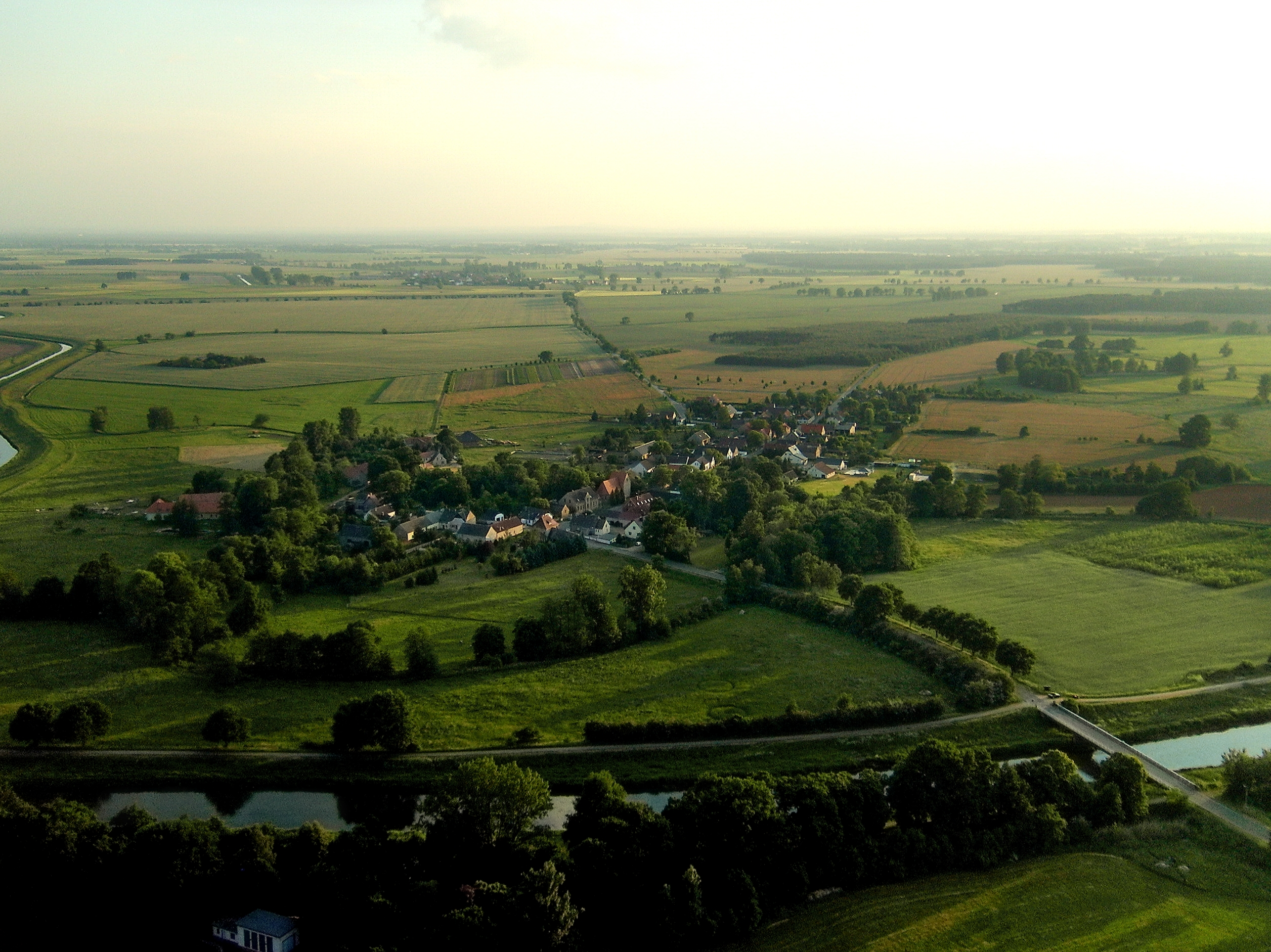 Der Ort Würdenhain aus der Luft. Im Vordergrund ist die Schwarze Elster zu sehen. Im Hintergrund der Oppach.